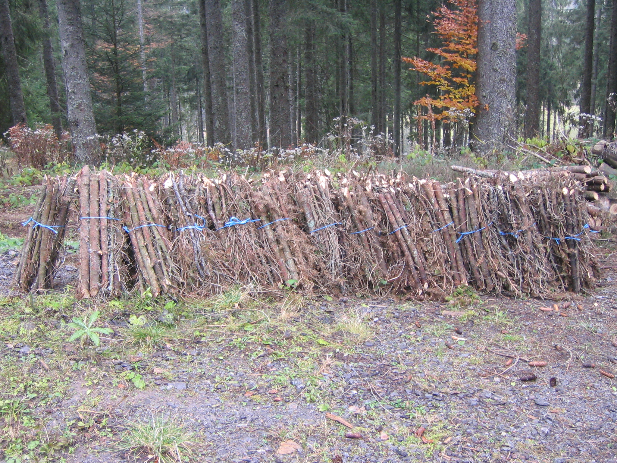 Wellen nennt man im Schwarzwald Bündel aus getrockneten Ästen, die als Brennmaterial genutzt werden. Das Werkzeug, mit dem sie gefertigt werden, heißt Wellenbock